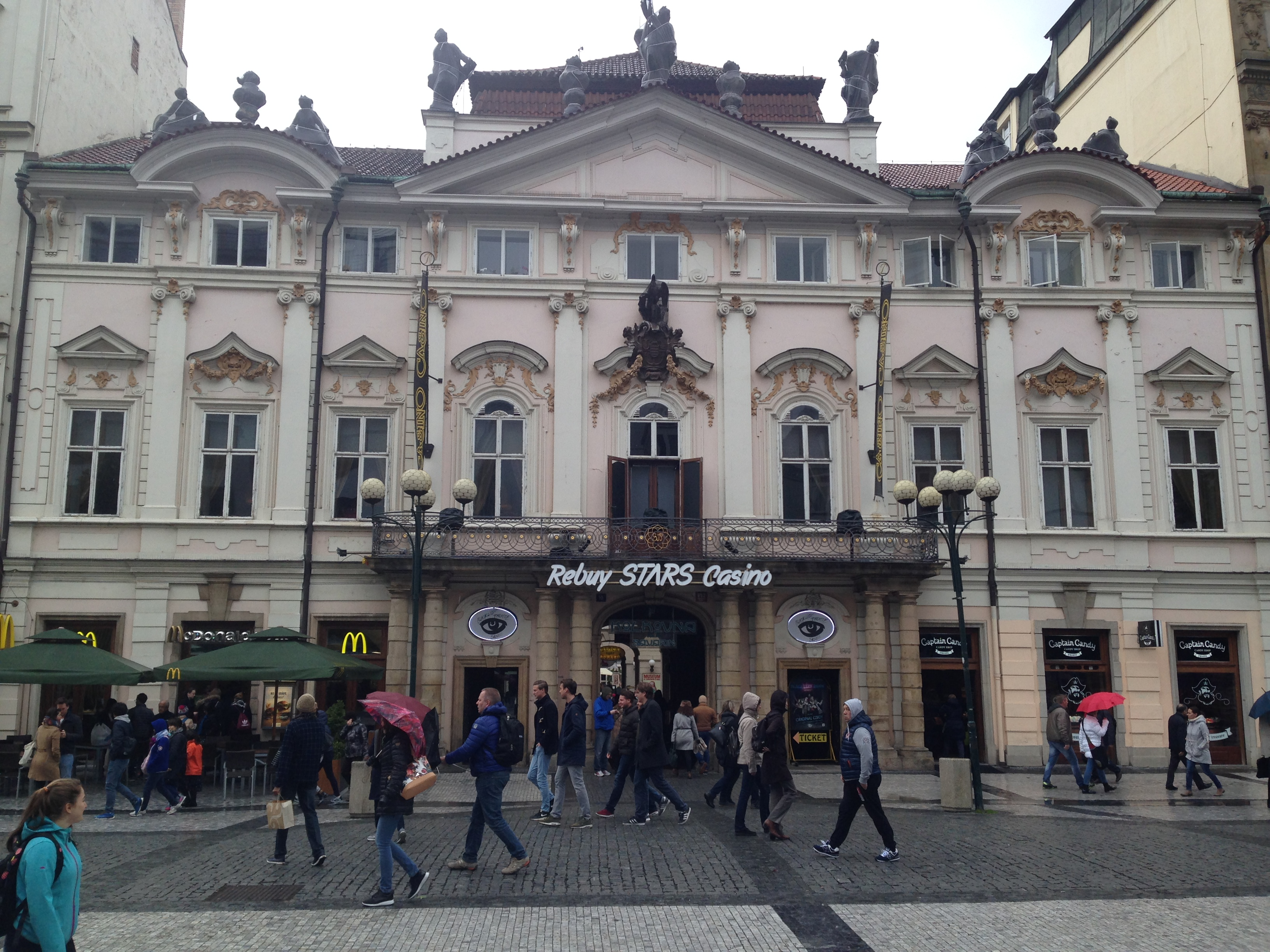 Casino und McDonald’s in der Na příkopě, Prag